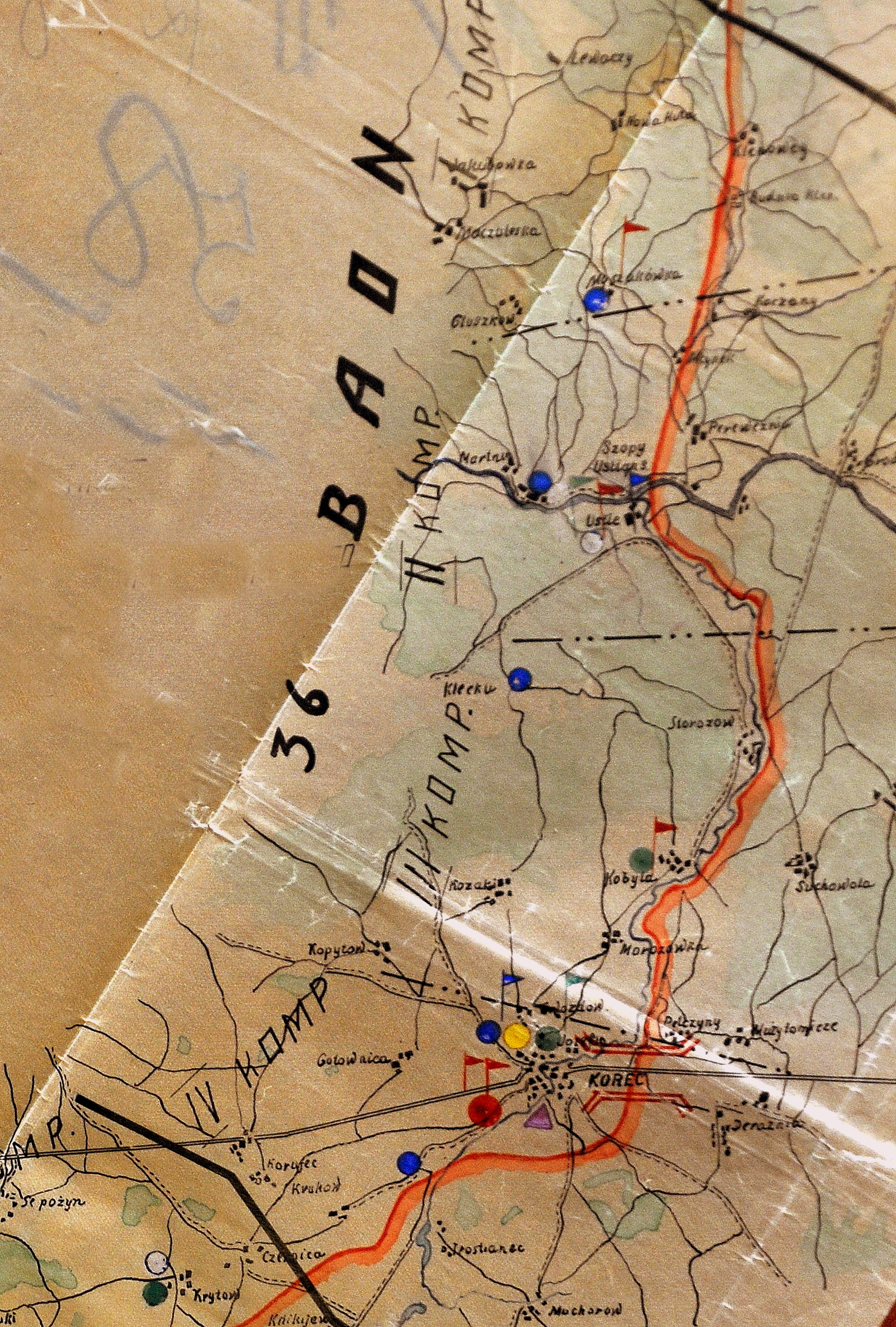 Szkic rozmieszczenia 36 batalionu celnego